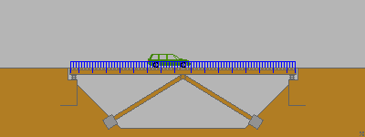 Sprengwerk